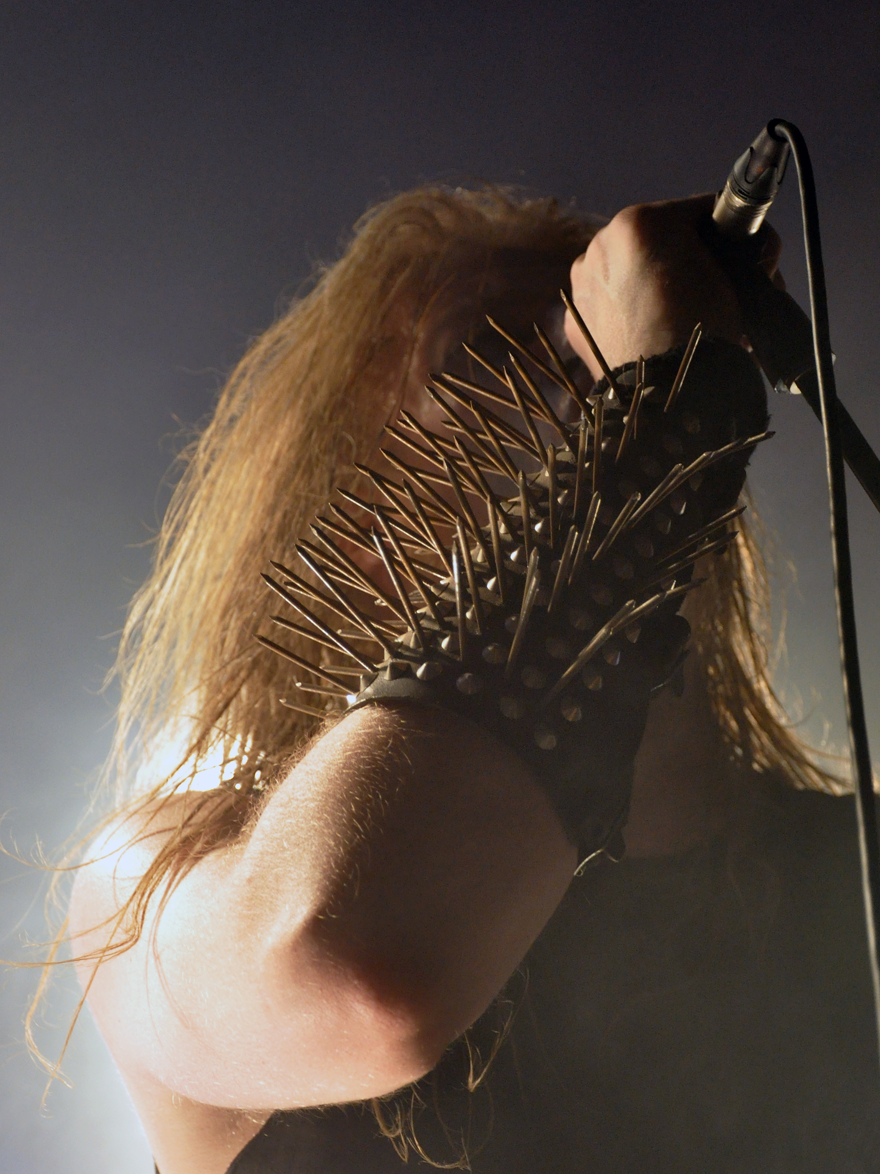 Type de bracelet clouté porté par des musiciens de Black Metal.